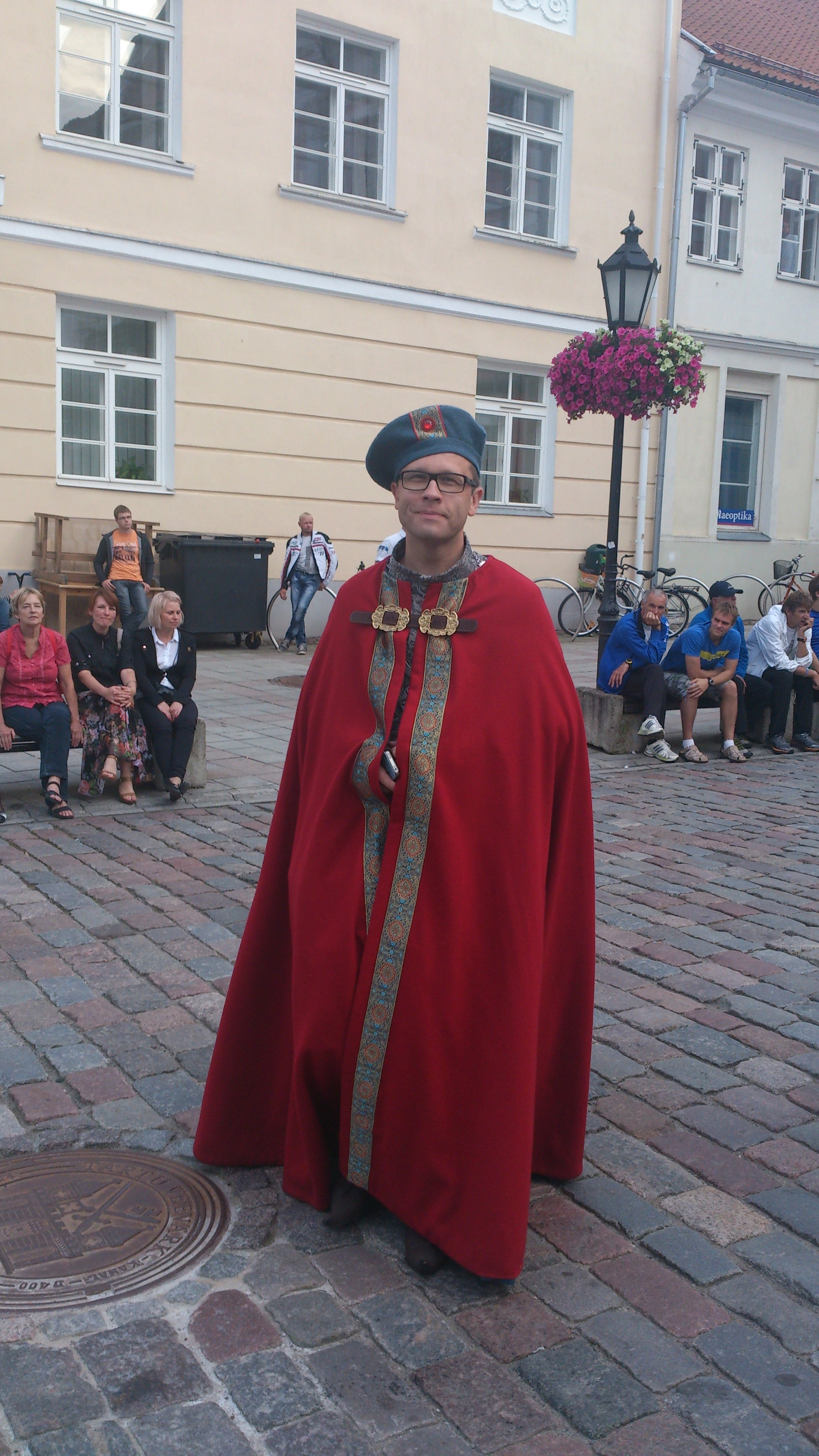 ´Tartu linnapea Urmas Klaas Tartu hansapäevadel 12. juulil 2014